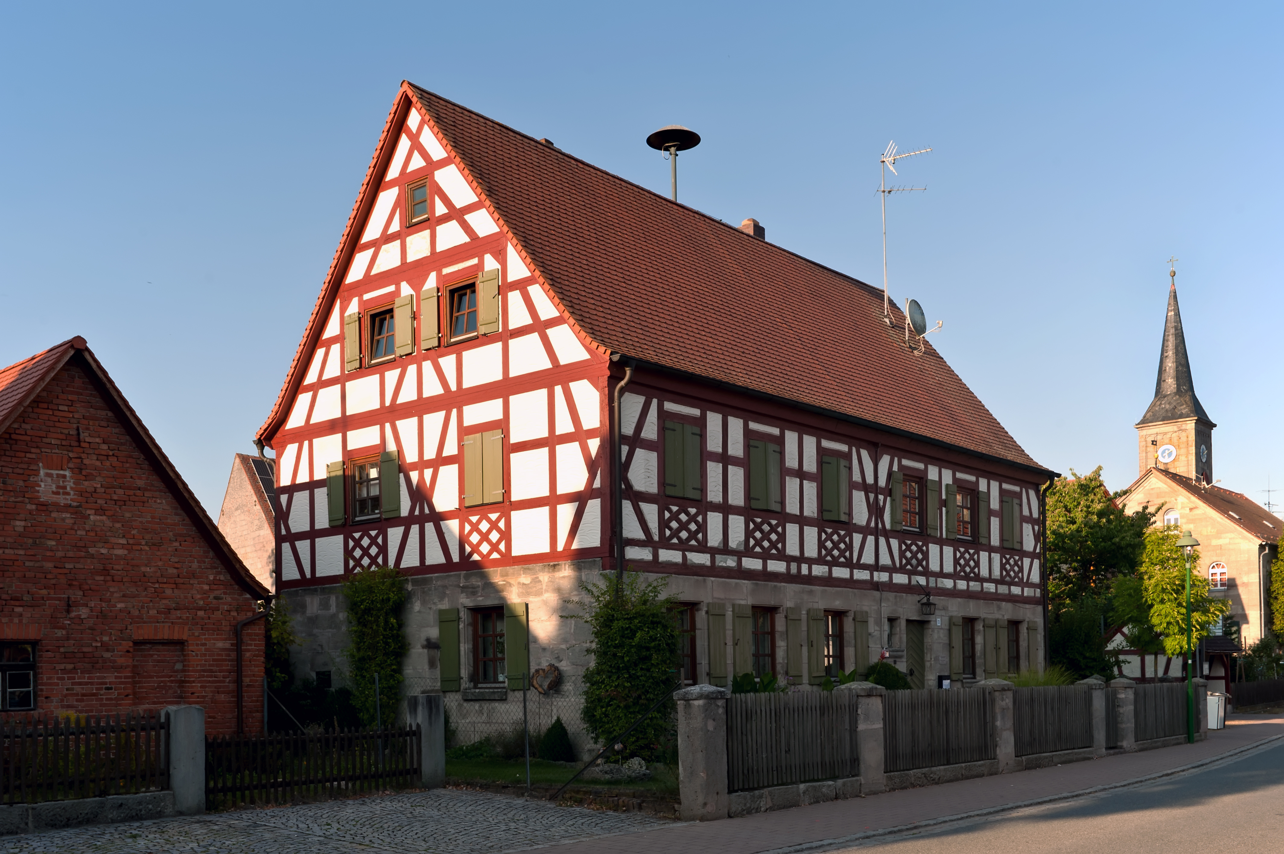 Zweigeschossiger Satteldachbau, Erdgeschoss Sandsteinquadermauerwerk, Obergeschoss und Giebel reiches Sichtfachwerk, 1800This is a photograph of an architectural monument.